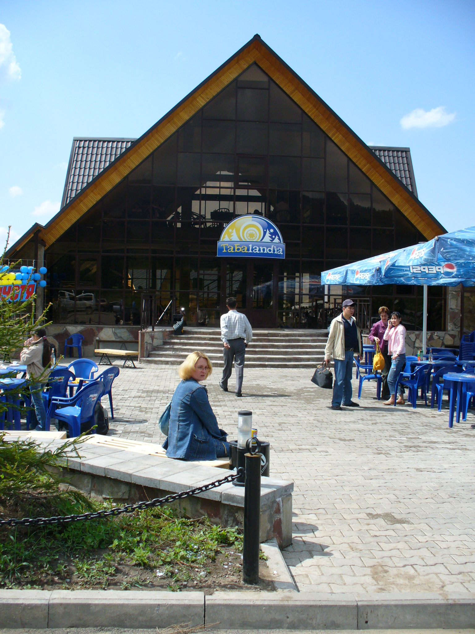 Корпус 2-х ярусного ресторанного комплекса горнолыжного курорта Табаган